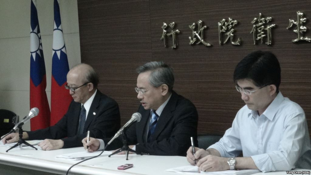 行政院衛生署就毒澱粉事件召開記者會，中央為署長邱文達。